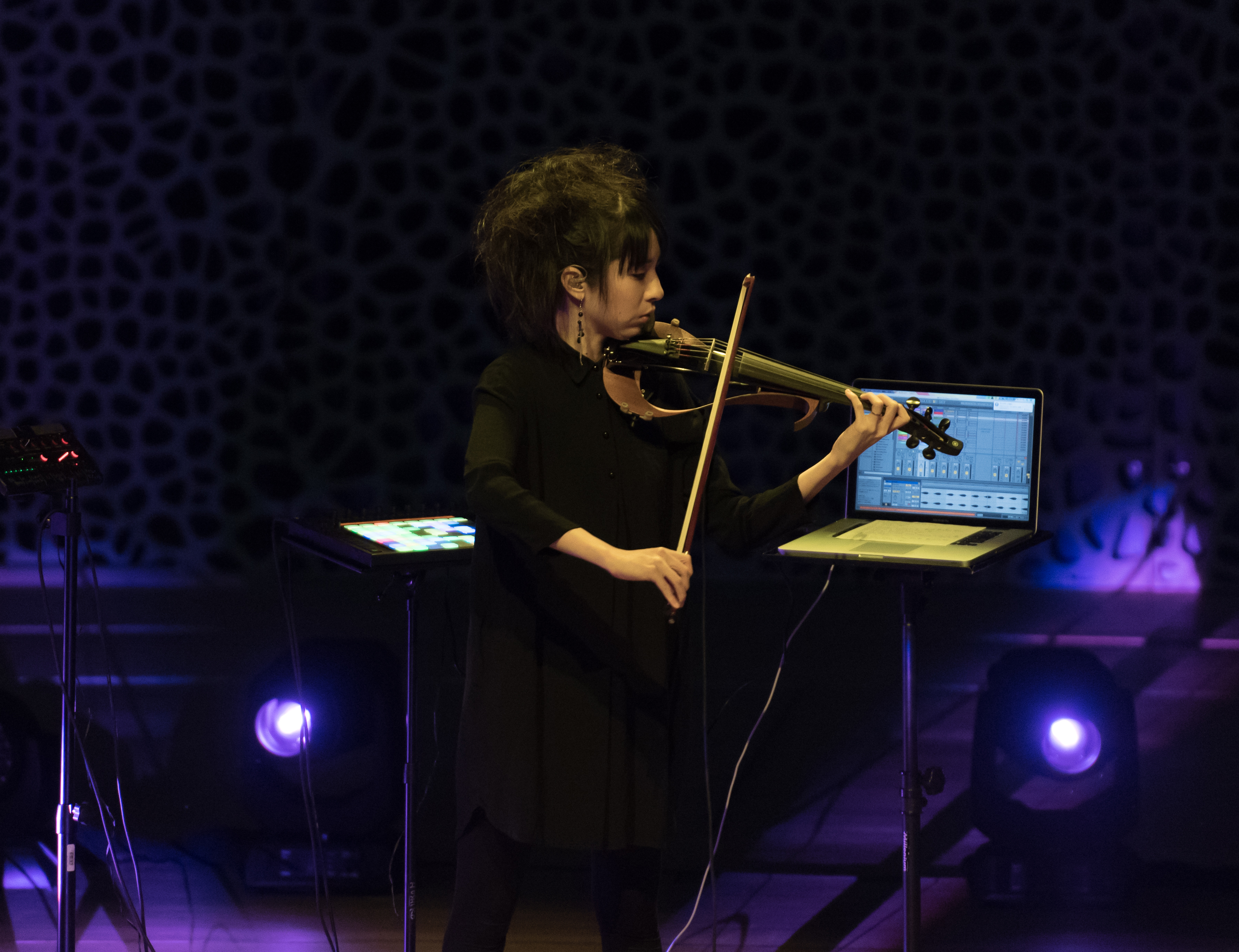 Tangerine Dream bei der Quantum of Electronic Evolution Tour in der Elbphilharmonie Hamburg 2018